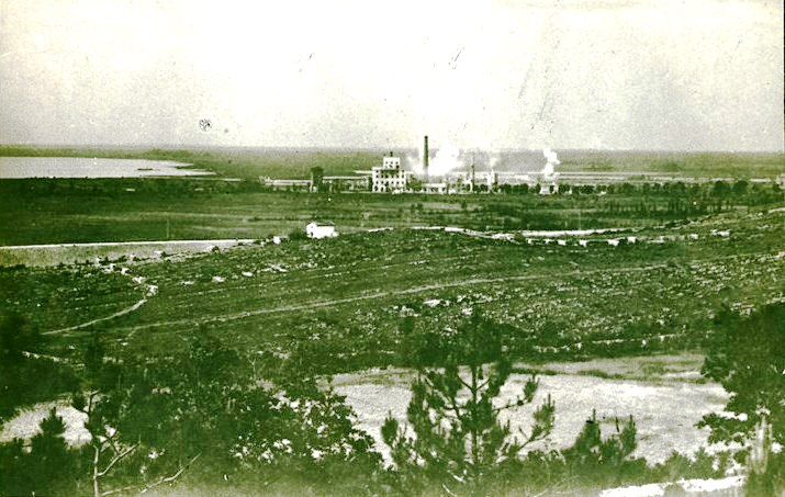 Снимка от попадение на австро-унгарската артилерия върху завзетите от италианската армия заводи "Адриа" в Монфалконе, Италия през Първата световна война.